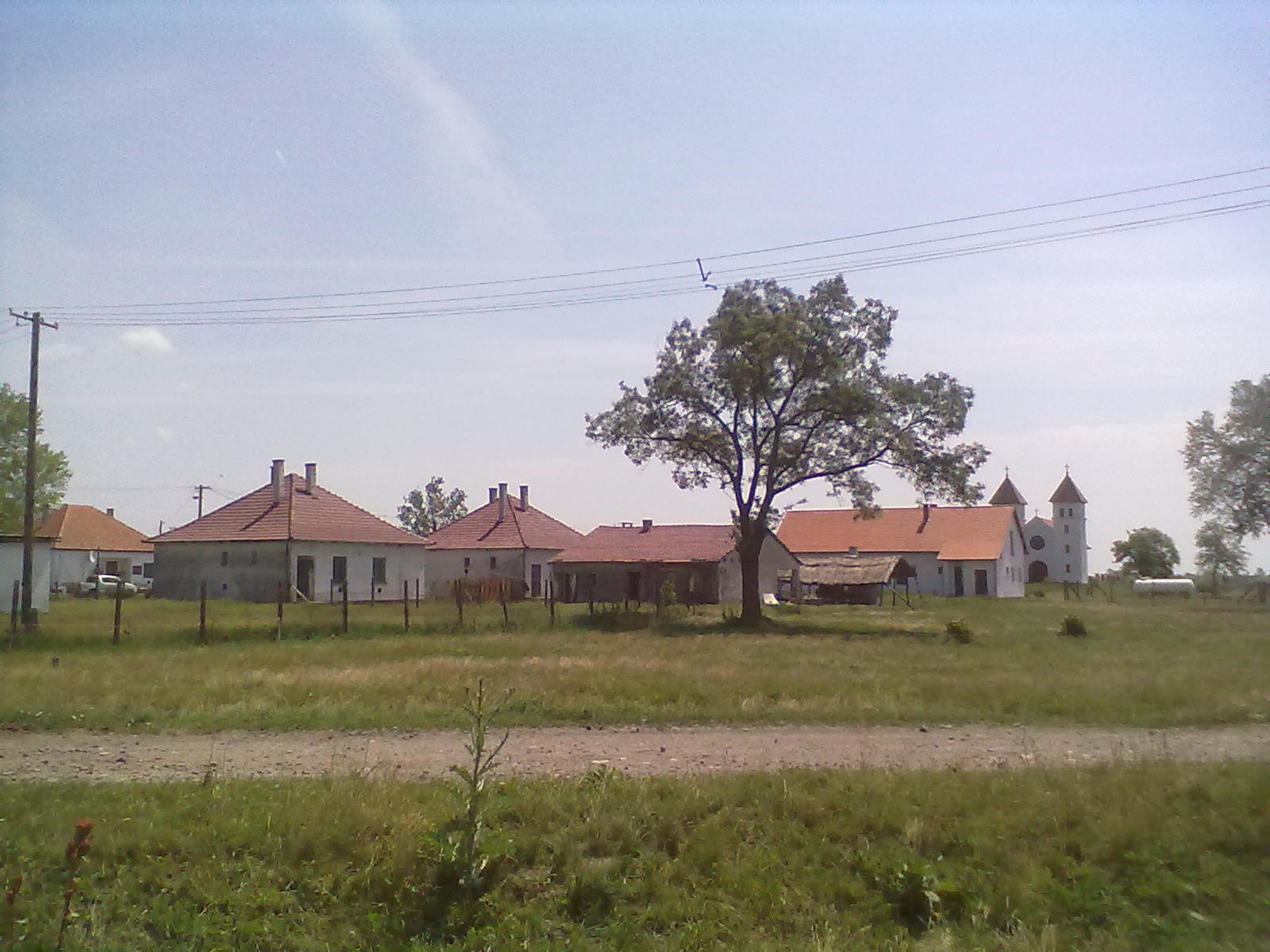 Alsószenttamási Mécses major (Tass, Bács-Kiskun megye)